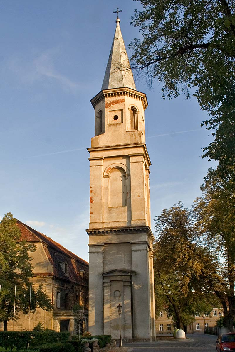 Bytom Odrzański - kościół protestancki.